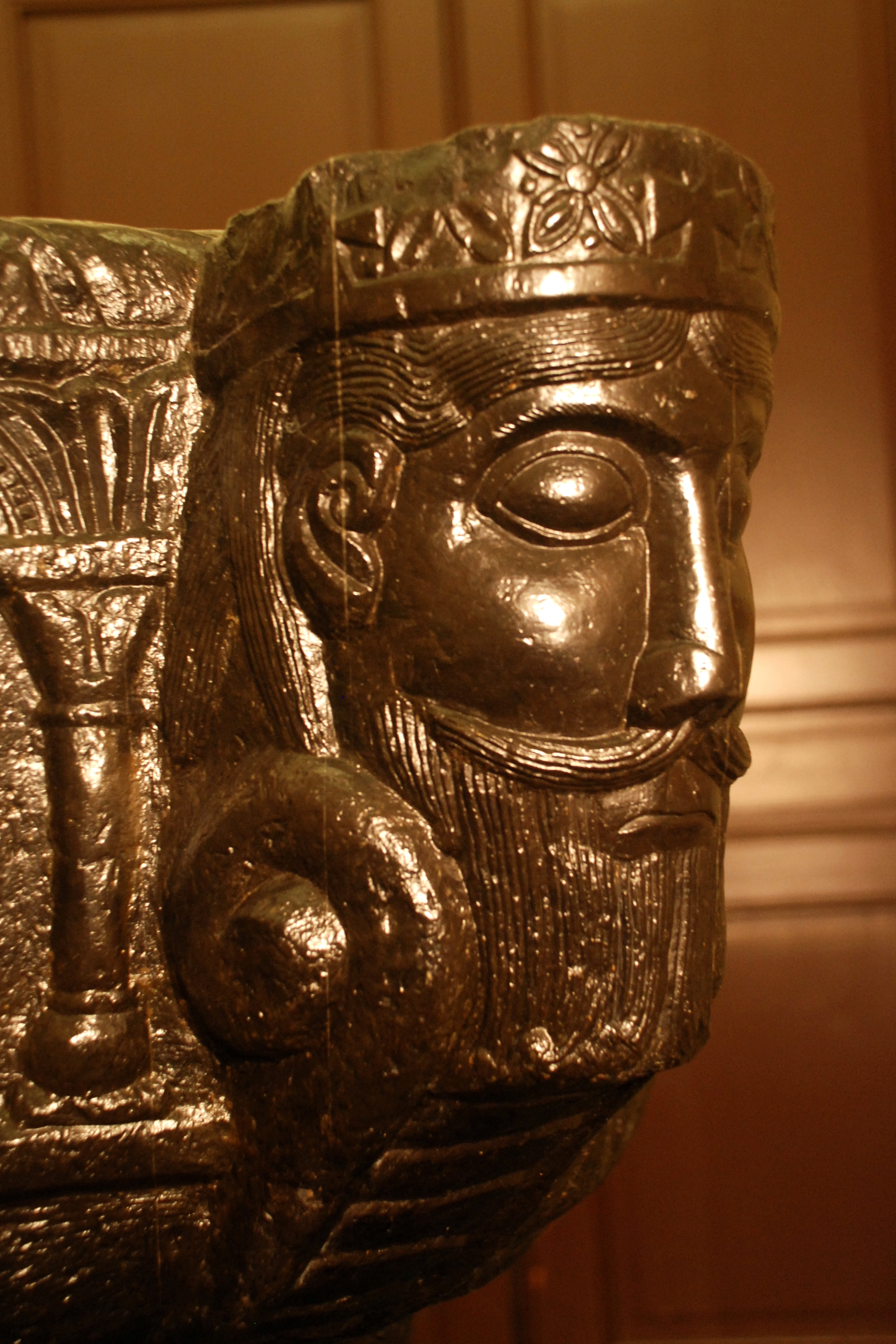 Belgique - Wallonie - Fonts baptismaux de Beauvechain